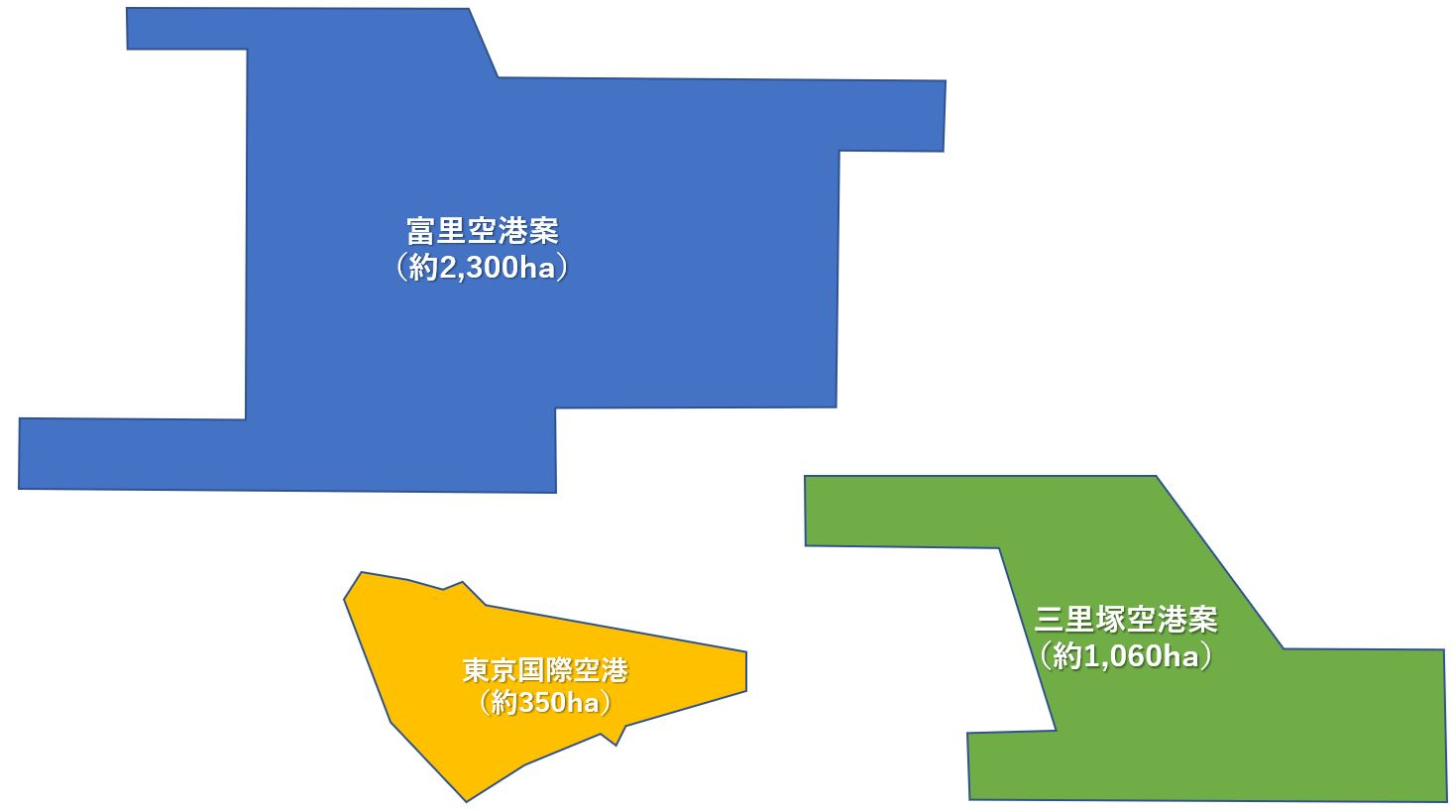 新東京国際空港の当初案と閣議決定された空港建設案の規模比較図。 昭和40年度運輸白書及び昭和42年度運輸白書をもとに作成。